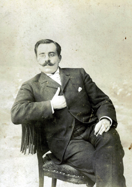 Abdeljelil Zaouche (col. privée)